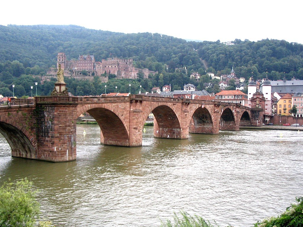 Alte Bruecke und Schloss